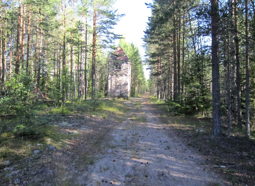 Vanntårnet ved Gaukås stasjon ved den nedlagte Treungenbanen. Traseen kan følges gjennom skogen, men selve stasjonsbygningen brant ned i 2008.